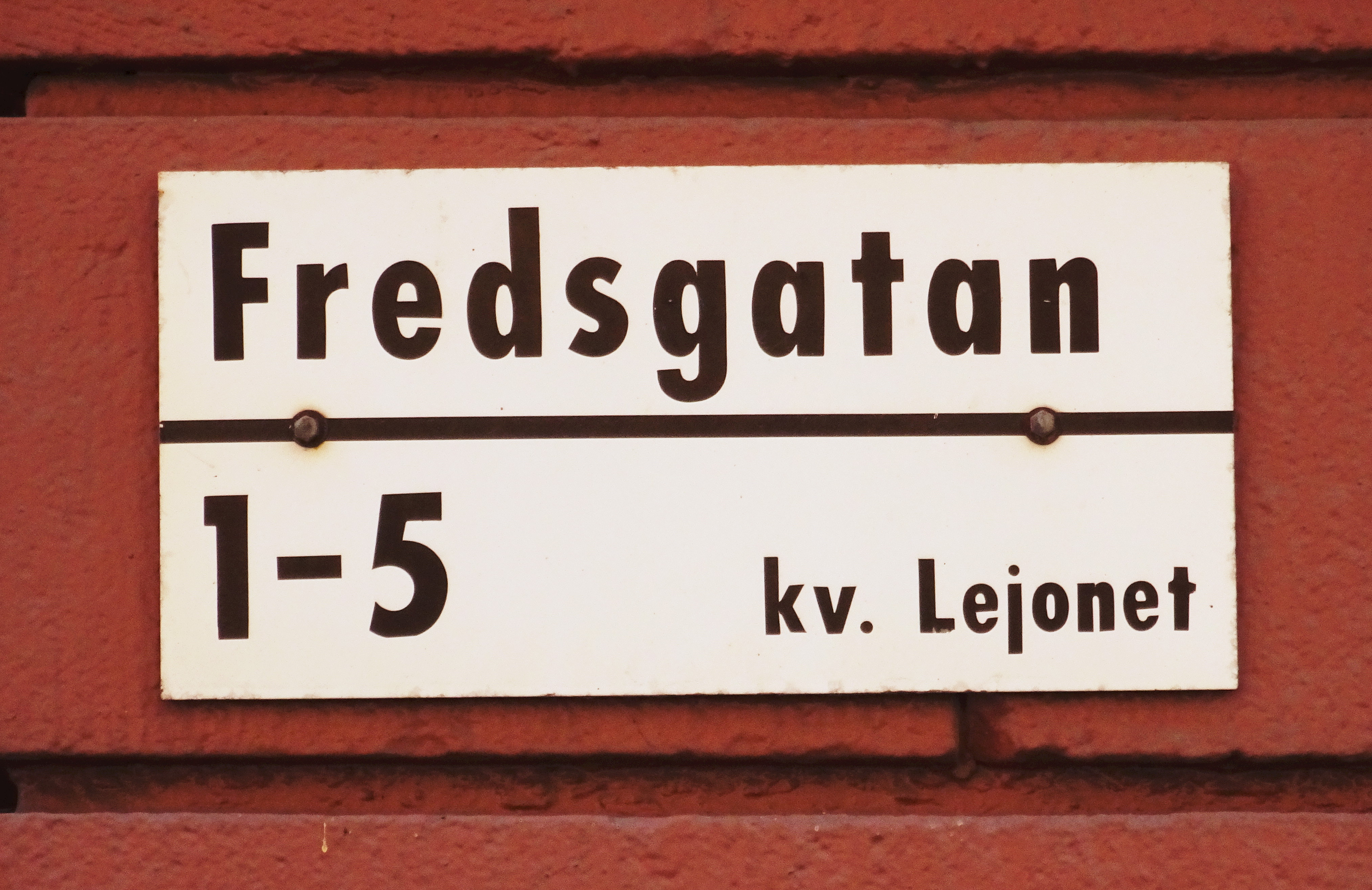 Fredsgatan, kv. Lejonet